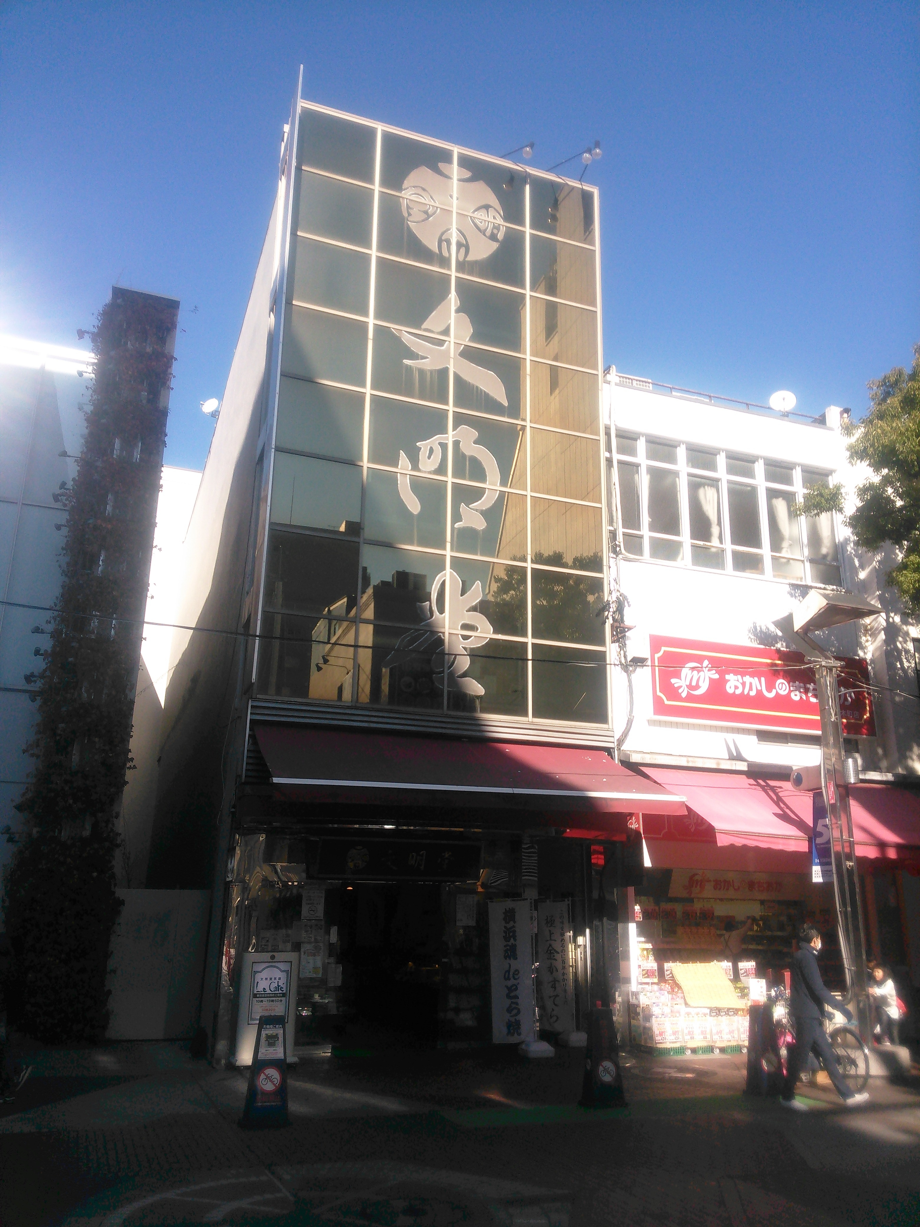 横浜・伊勢佐木町、文明堂横浜店